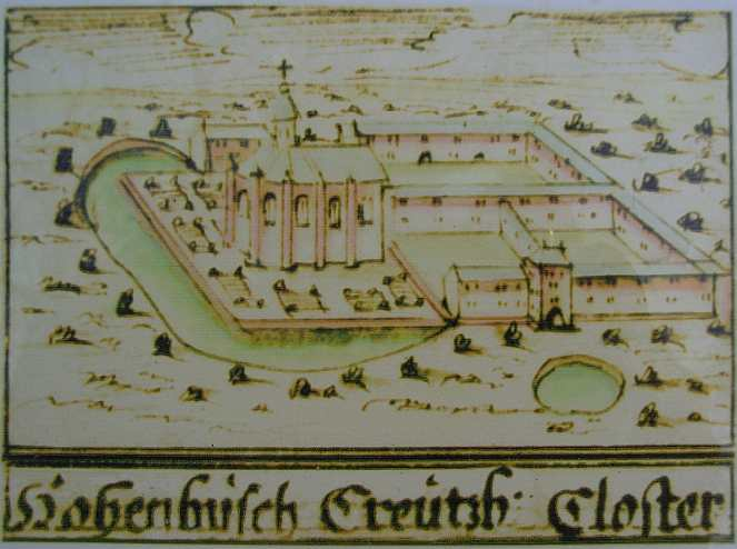 Kreuzherrenkloster Hohenbusch, Codex welser